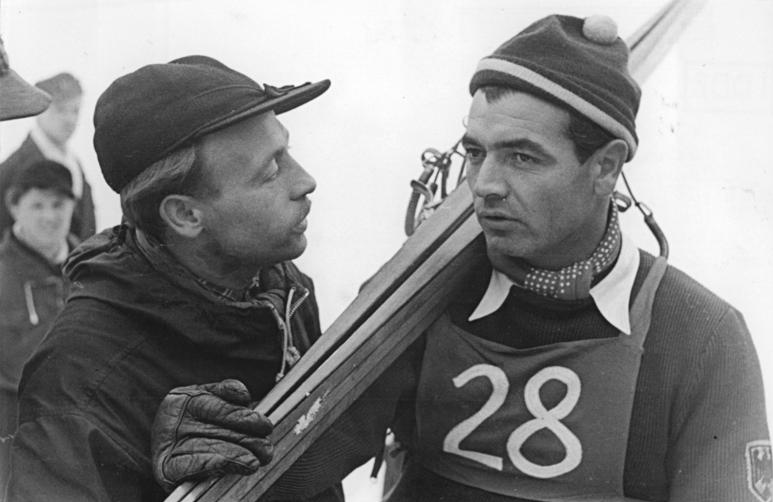 Zentralbild Quasch. 16.2.1953 IV. Wintersportmeisterschaften der Deutschen Demokratischen Republik für Frieden, Einheit, Demokratie und Sozialismus vom 10. - 15.2.1953 in Oberhof Sondersprunglauf auf der Thüringen-Schanze UBz: Sepp Weiler aus Oberstdorf (rechts) belegte den 2. Platz.